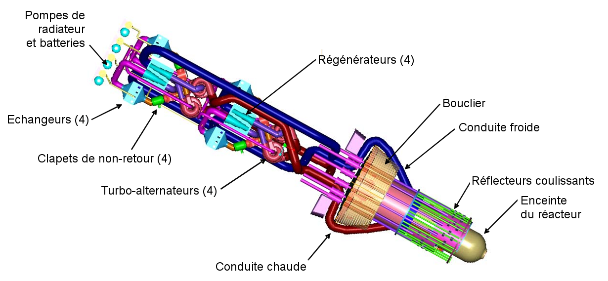 Configuration à 4 convertisseurs du générateur électro-nucléaire proposé pour la mission JIMO